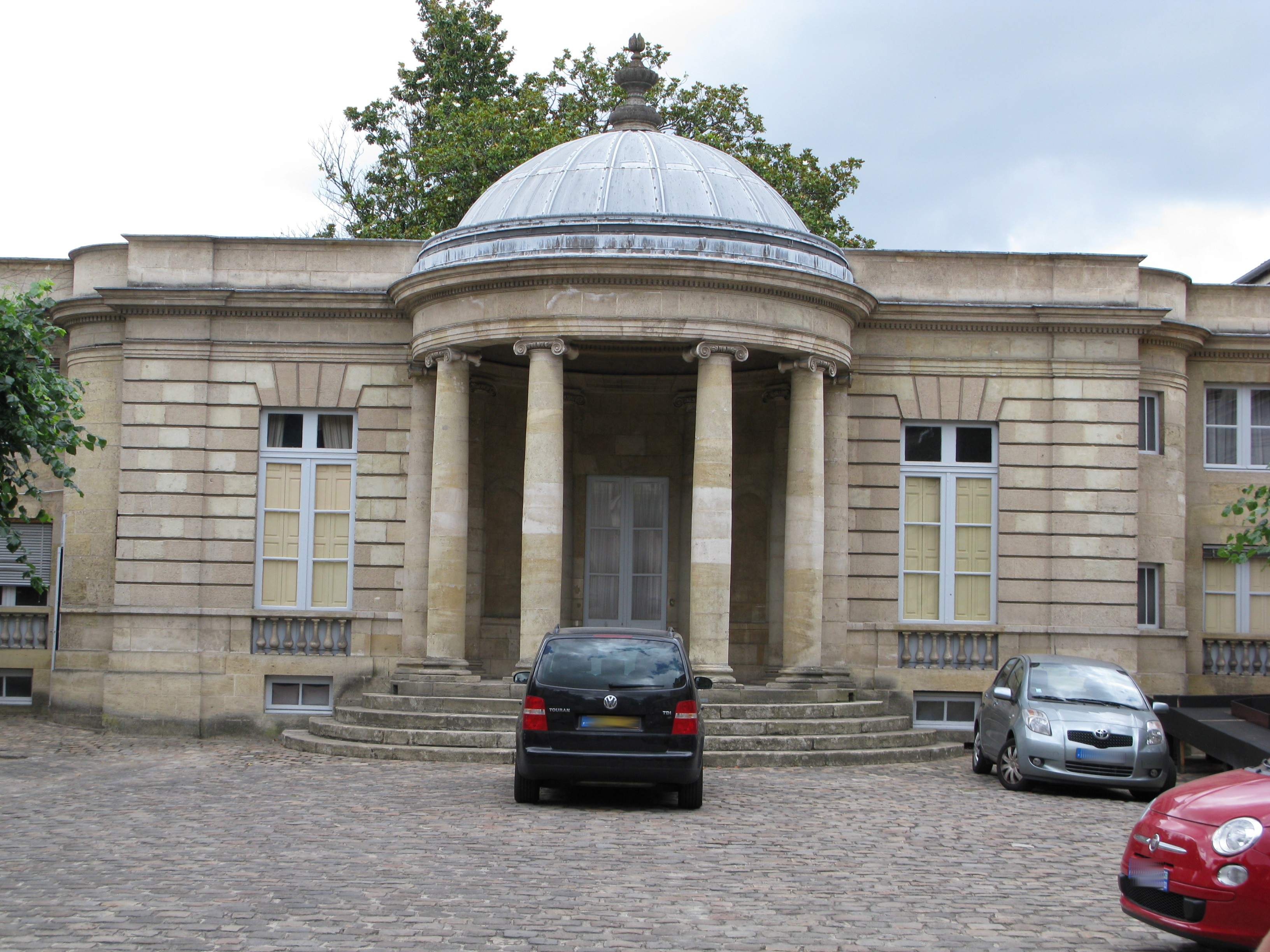 Hôtel Saint Marc à bordeaux.